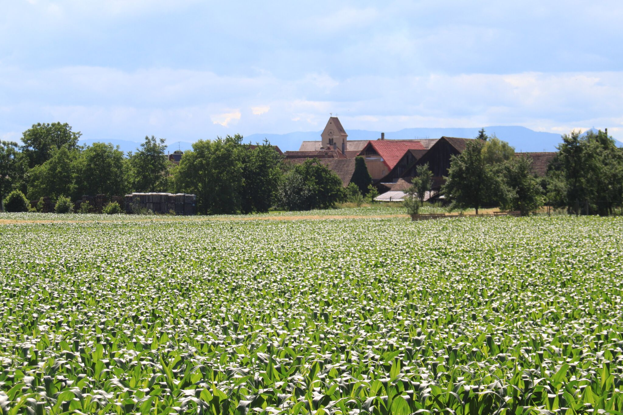 Champs et forêts avec vue sur l'église